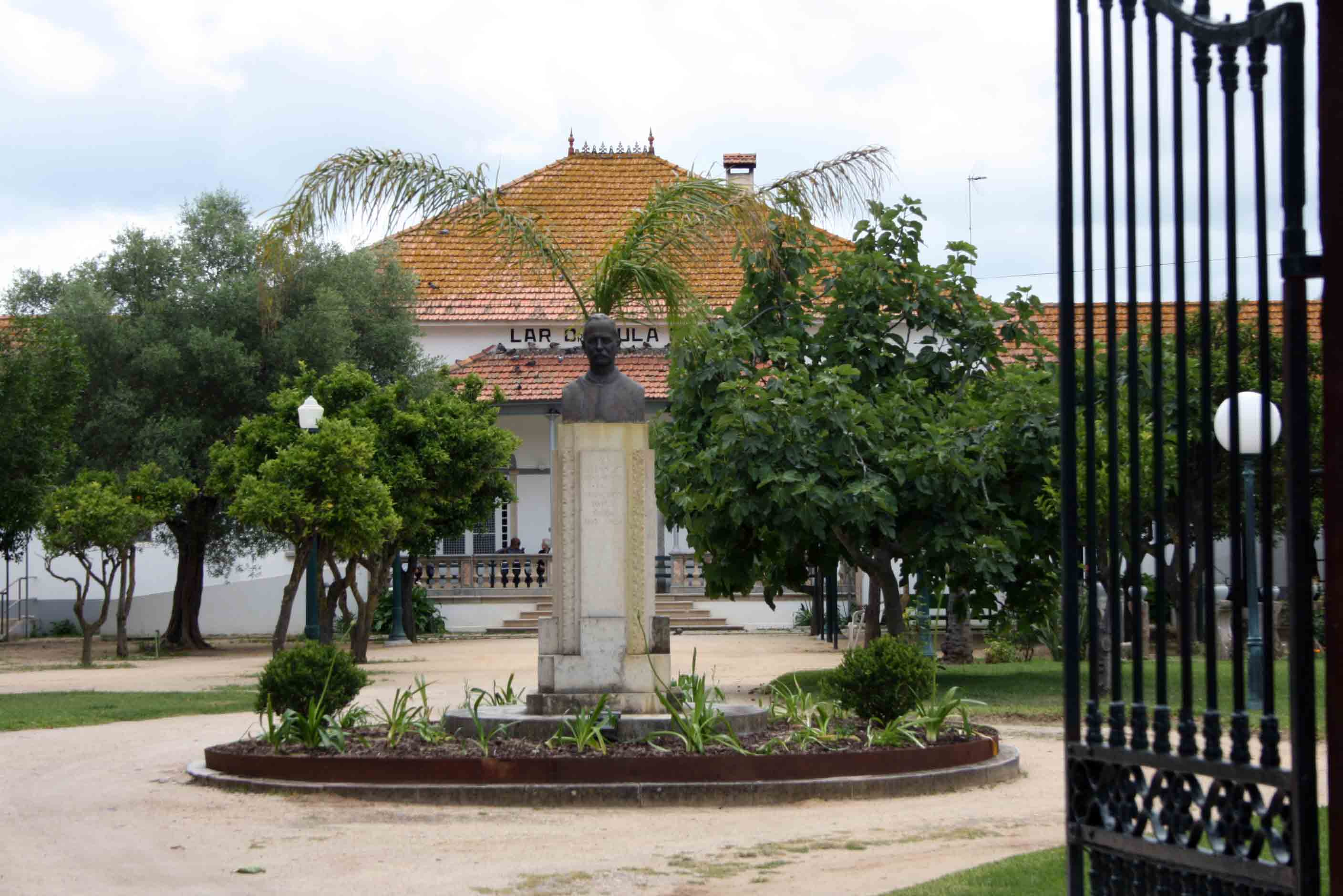 SCMS - Lar Paula Borba